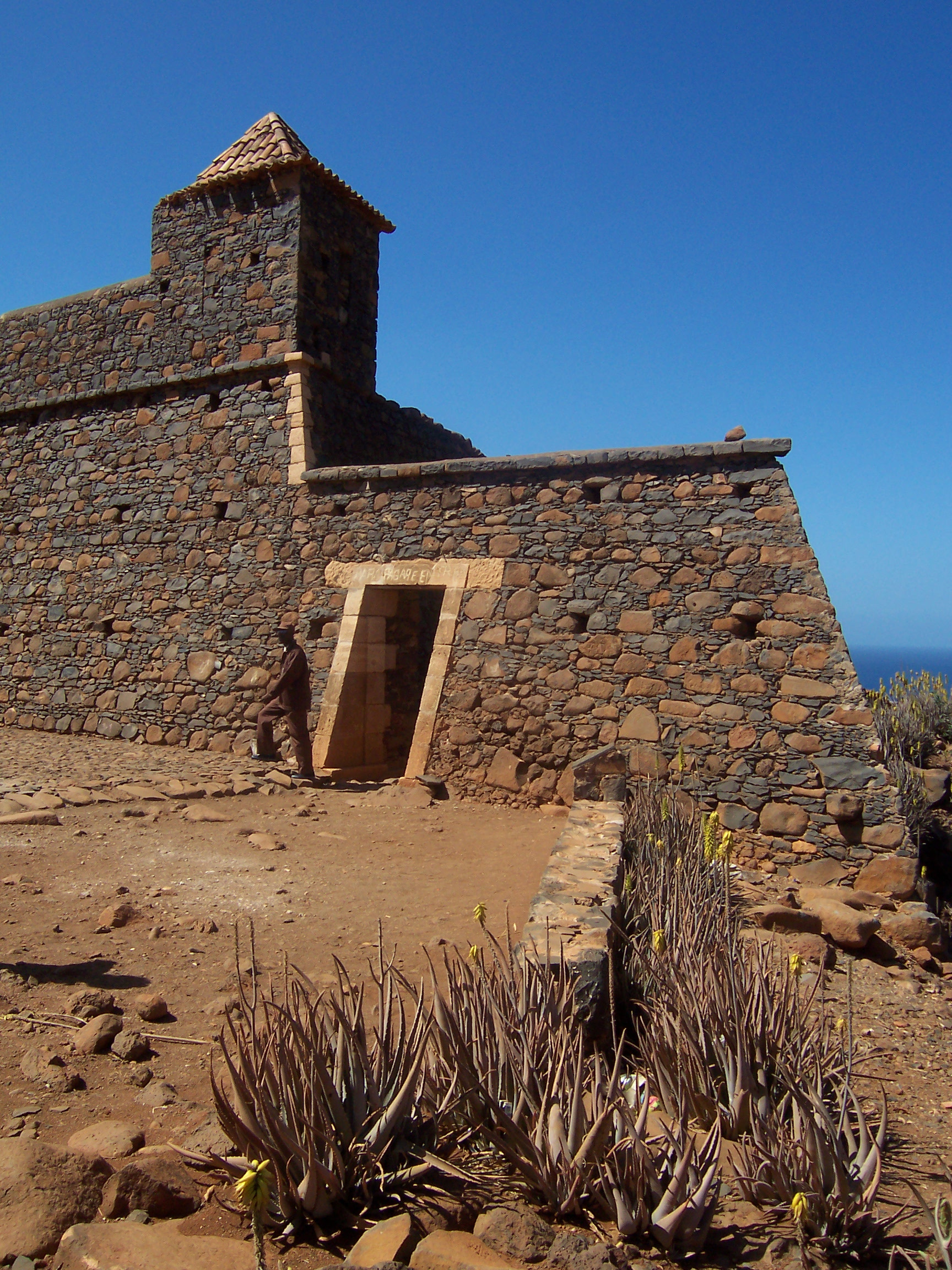 Fort de "Real de San Felipe" Cidade Velha, Cap Vert